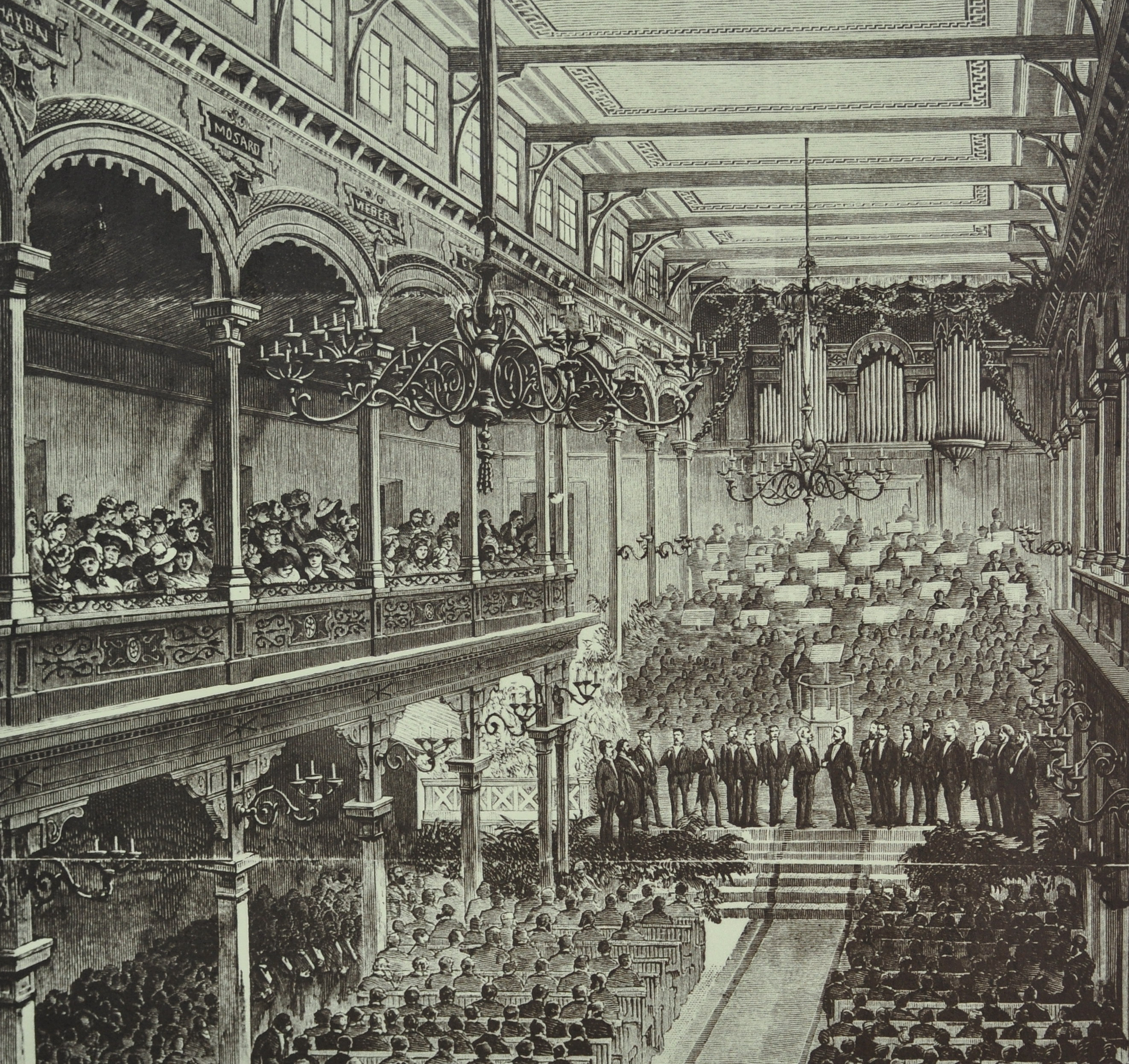 Der grosse Saal der Tonhalle bei der Eröffnung der schweizerischen Landesausstellung am 1. Mai 1883.Fotografiert von den Schautafeln der Archäologischen Grabung Parkhaus Opéra in Zürich (Schweiz); die Beschreibungen sind den entsprechenden Abbildungen im Wortsinn entnommen.